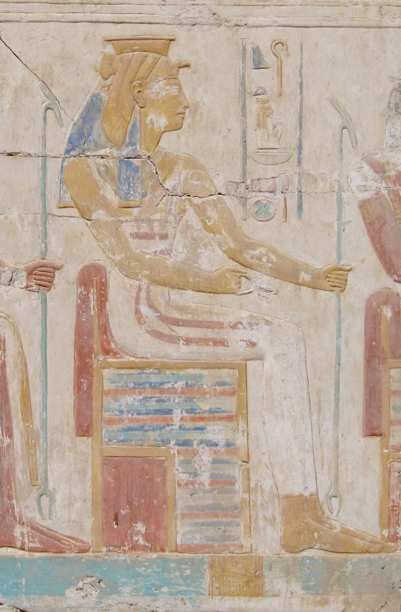 Relief im Tempel Ramses II. in Abydos, Ägypten